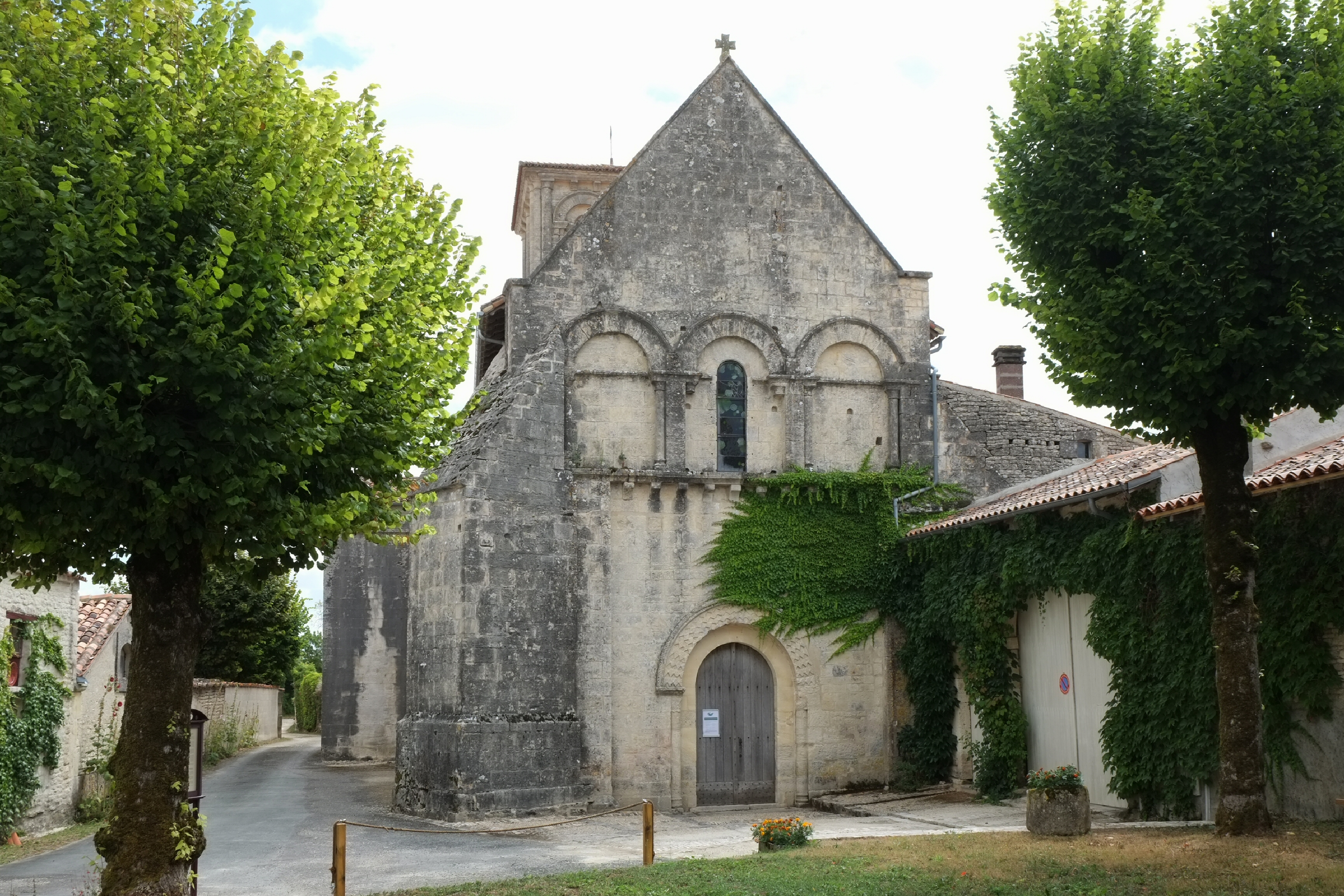 Église Saint-Symphorien Haimps Charente-Maritime France .